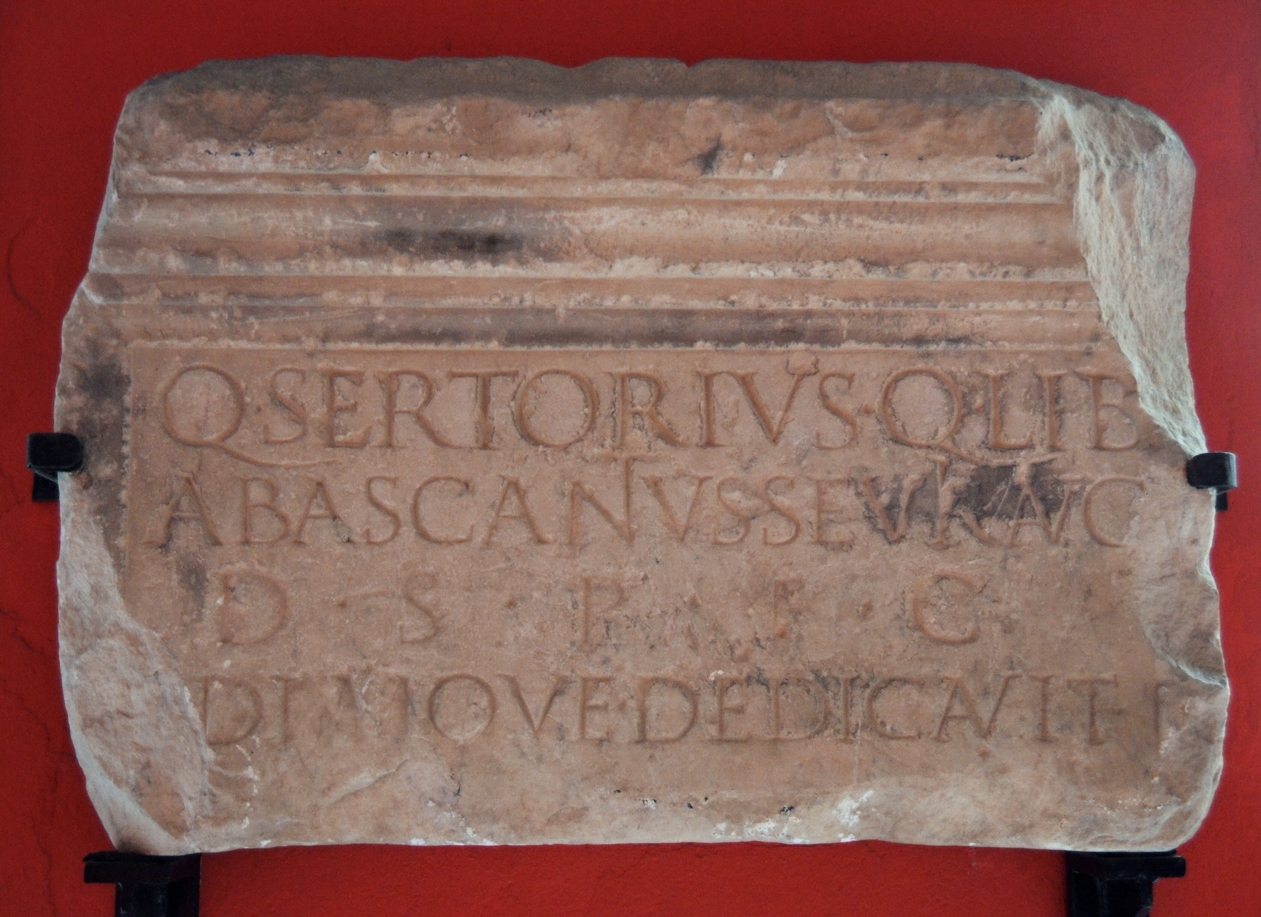 Inscripció romana QUINTUS SERTORIUS, marbre de Buixcarró, 48 x 68 x 13 cm. Procedeix de la granja dels pares dominics del Pla de Quart (segle XVIII). Museu de Belles Arts de València.